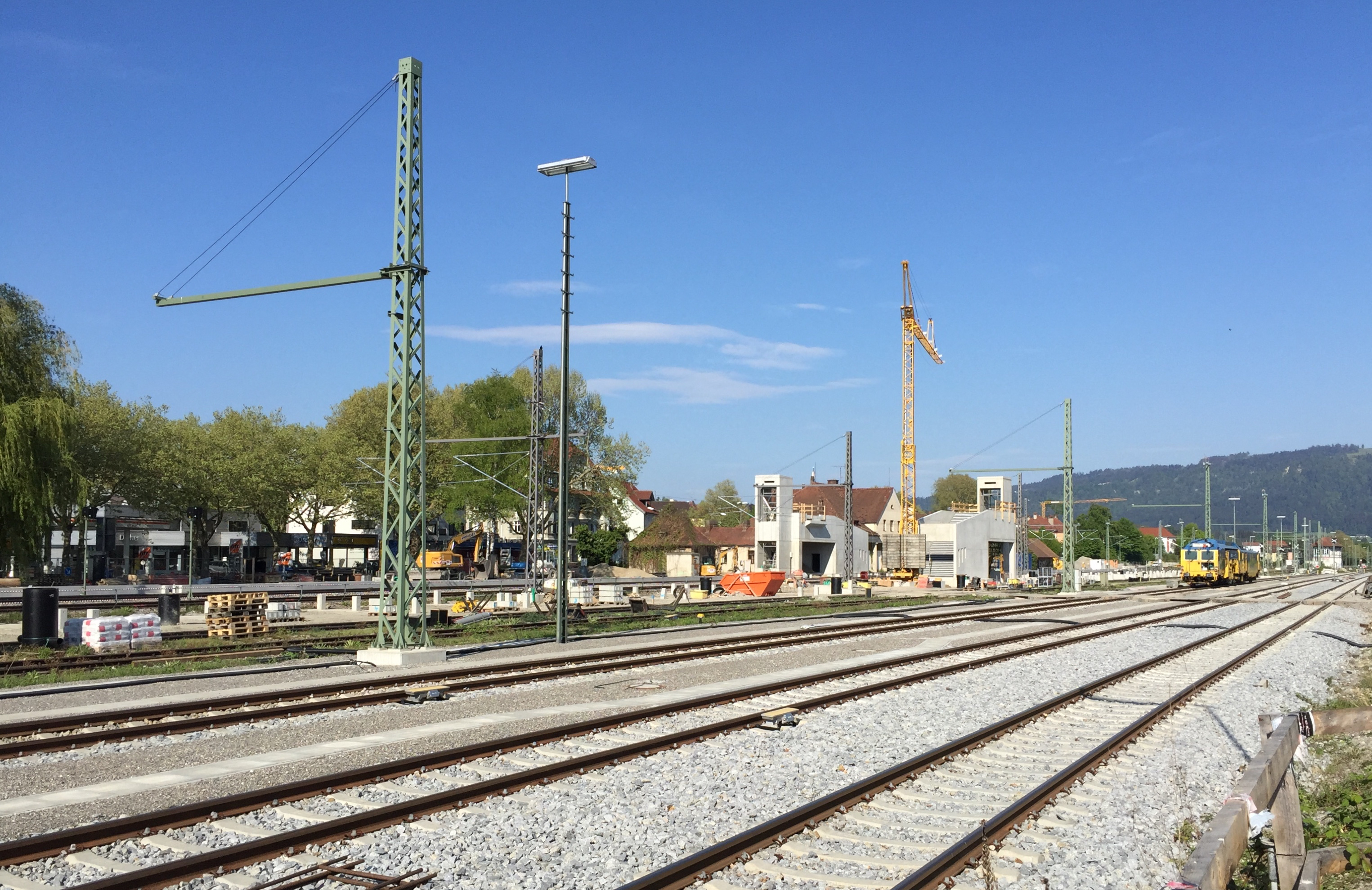 Bahnhof Lindau-Reutin Baufortschritt April 2020